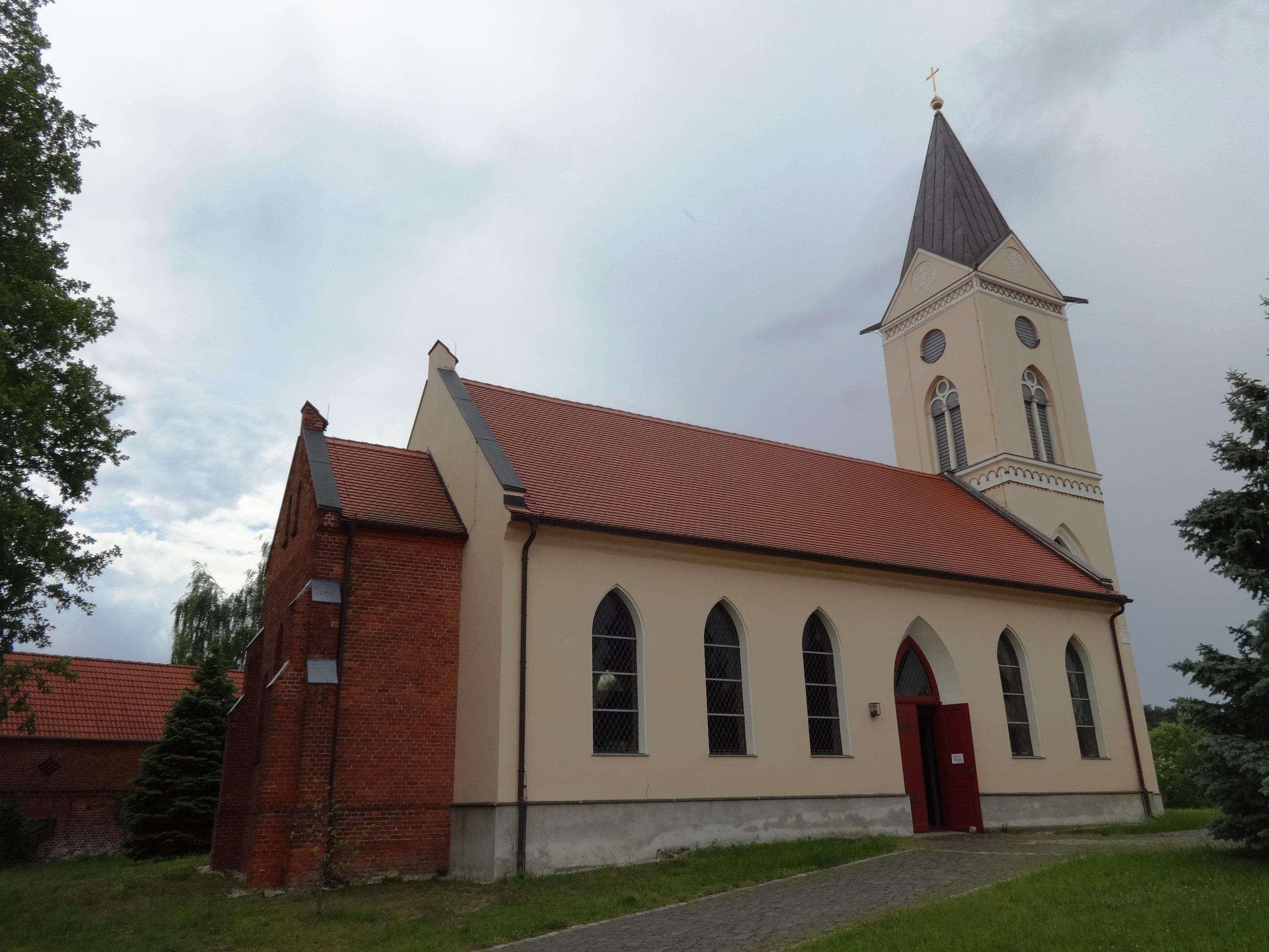 Die Dorfkirche Rieben wurde im Stil der romanischen Neugotik in den Jahren 1817 bis 1820 errichtet. Im Jahr 1896 erweitere die Kirchengemeinde die Saalkirche und schaffte eine Orgel an. Nachdem in den 1970er Jahren bei einer Sanierung ein Putz verwendet wurde, der das Bauwerk schädigte, sanierte die Gemeinde den Sakralbau in den Jahren 2006 bis 2012. Das Sanierungskonzept sah dabei sowohl eine kirchliche, wie auch kommunale und soziale Nutzung vor.